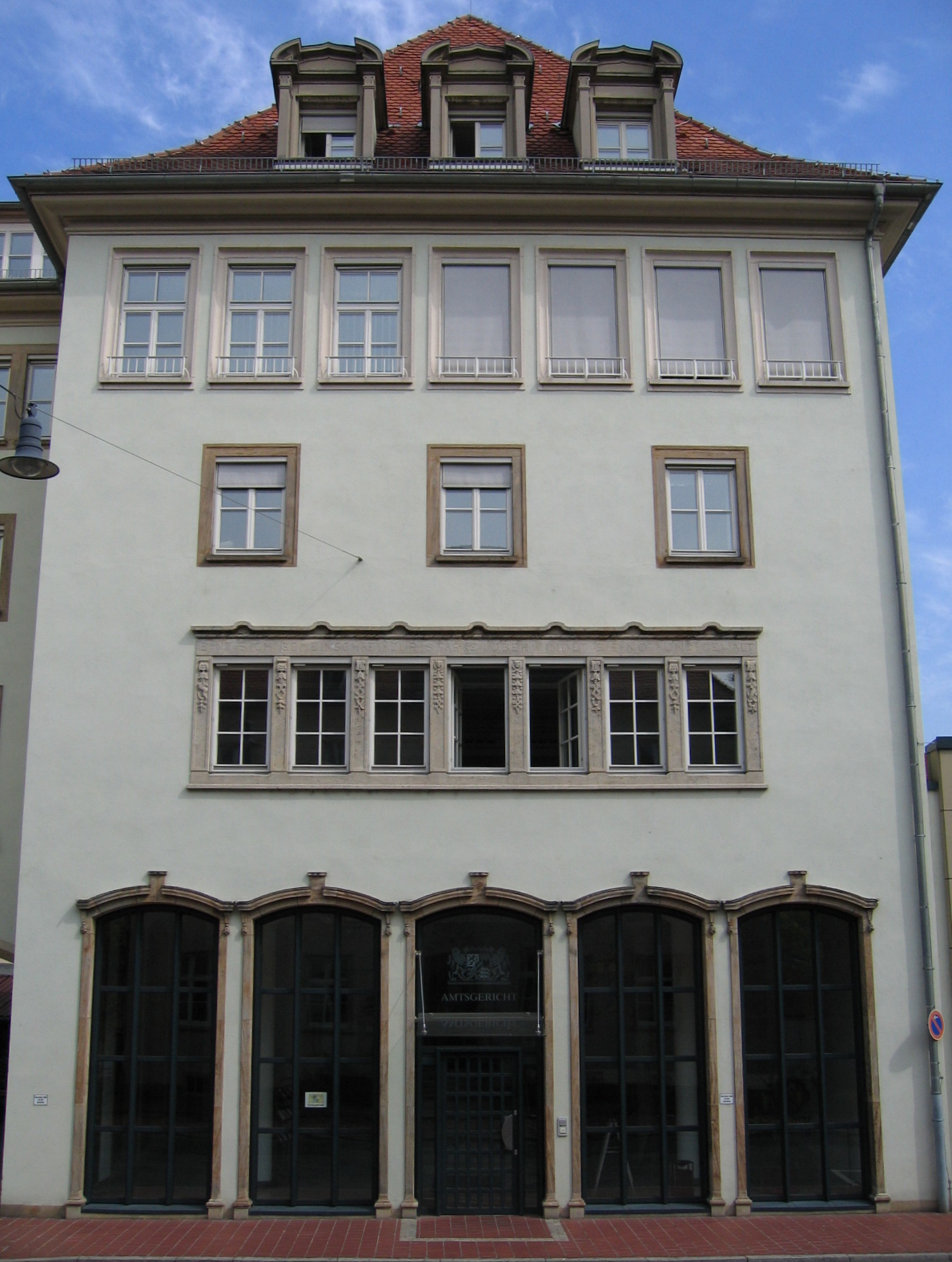 Description: Gebäude des Amtsgerichts (Teilansicht), Synagogenplatz 1 in Bamberg (Germany) Source: selbst fotografiert Date: 09. Sept. 2005 Author: Bubo